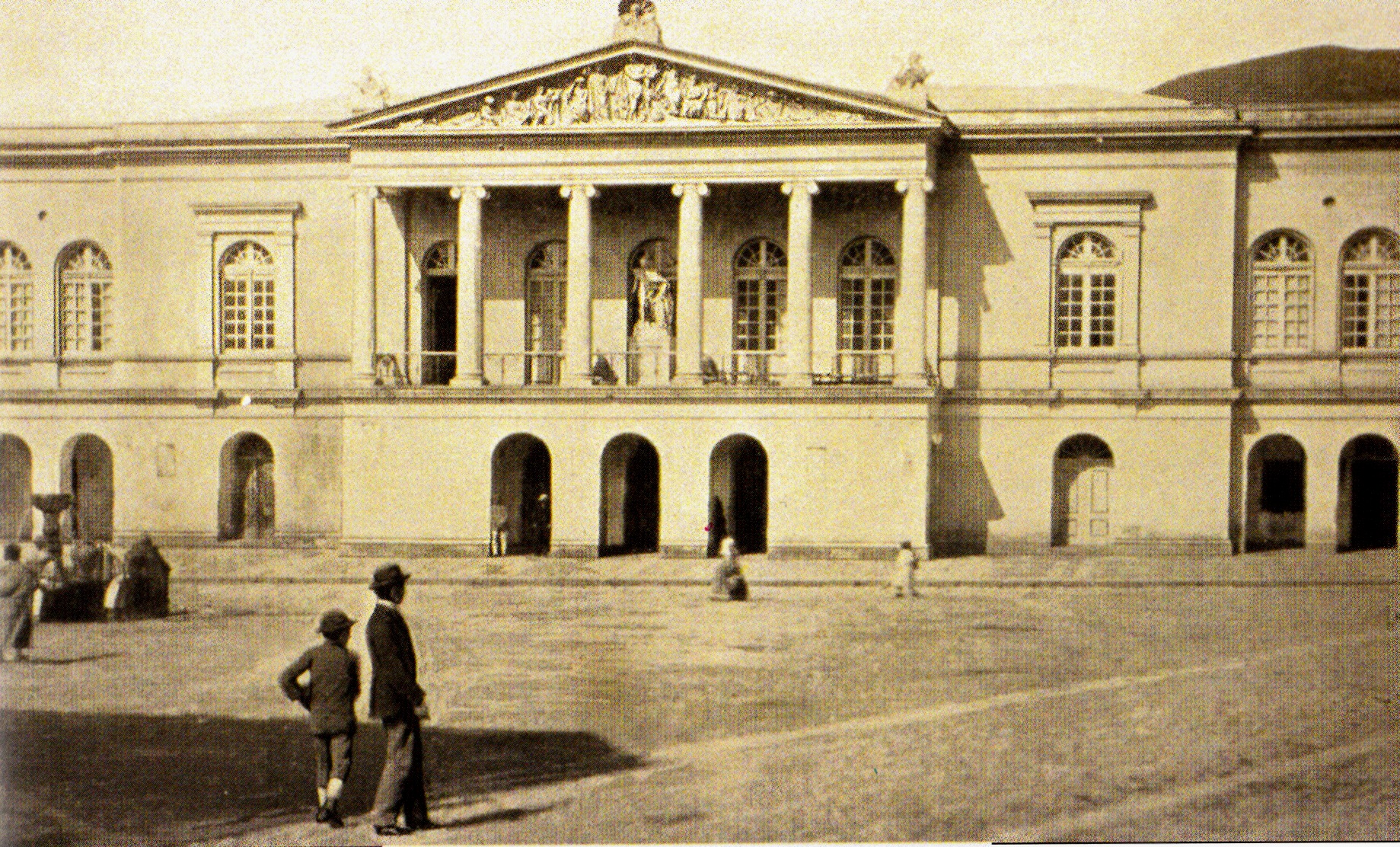 Fotografía del Teatro Nacional Sucre, en la ciudad de Quito, a finales del siglo XIX.